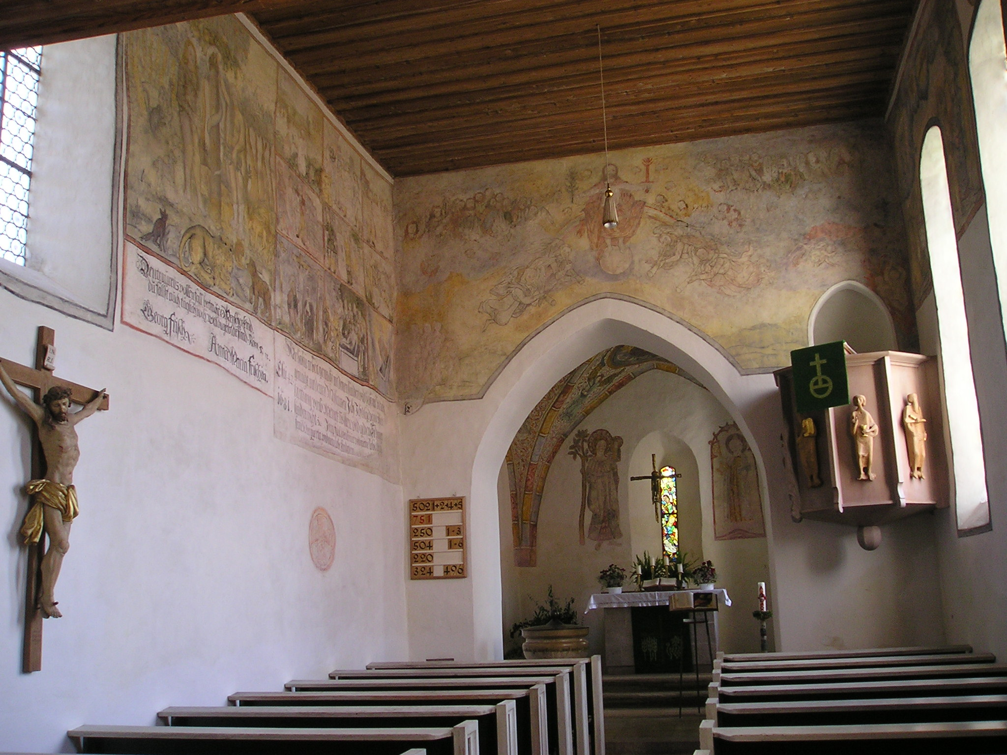 Bühl i. Ries, Gemeindeteil von Alerheim im Landkreis Donau-Ries (Bayern), Evang. St.-Marien-Kirche, Inneres, Blick zum Chor und zur Nordwand